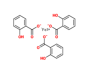 Representación esquemática del Salicilato de Hierro (III)